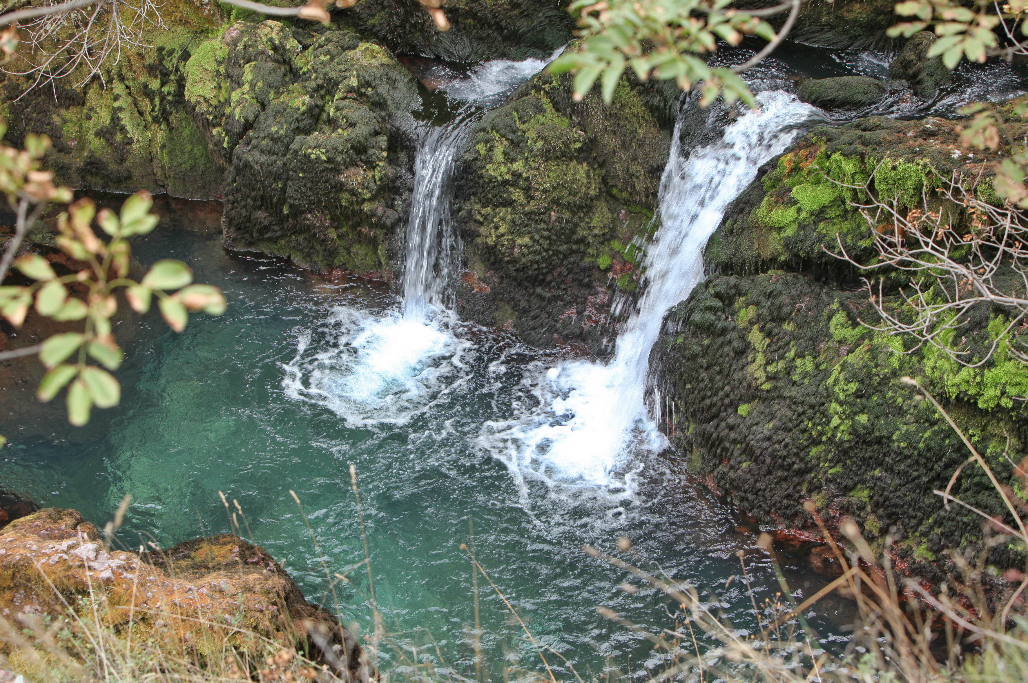 Bijeli Drim (Drin) 27. listopada 2011. 2011 S 618 KosDrin 08